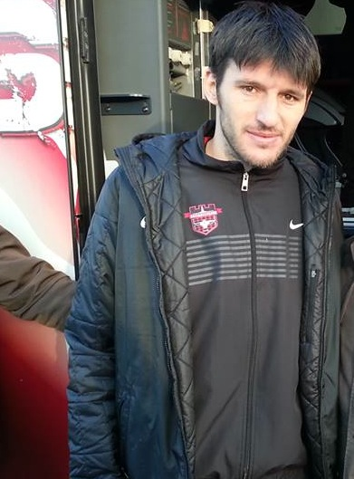 İbrahim Akın